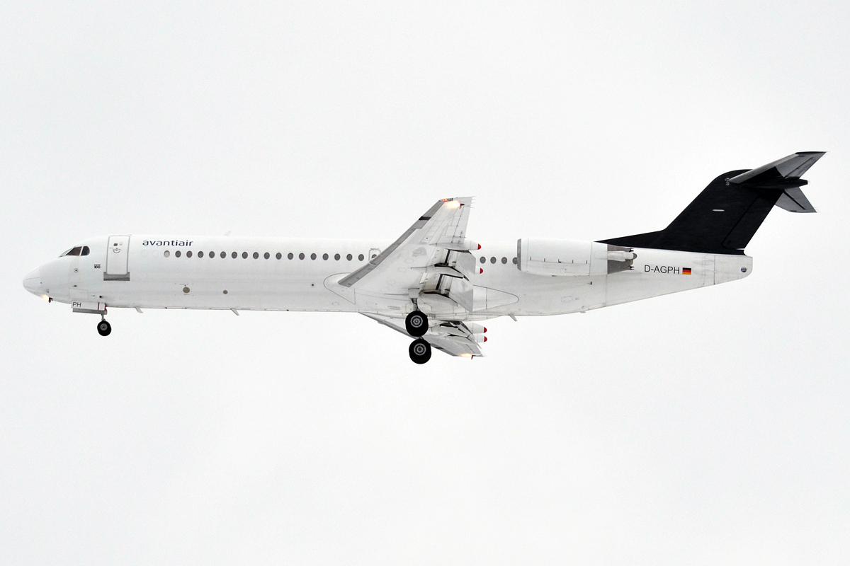 Avanti Air, D-AGPH, Fokker F100